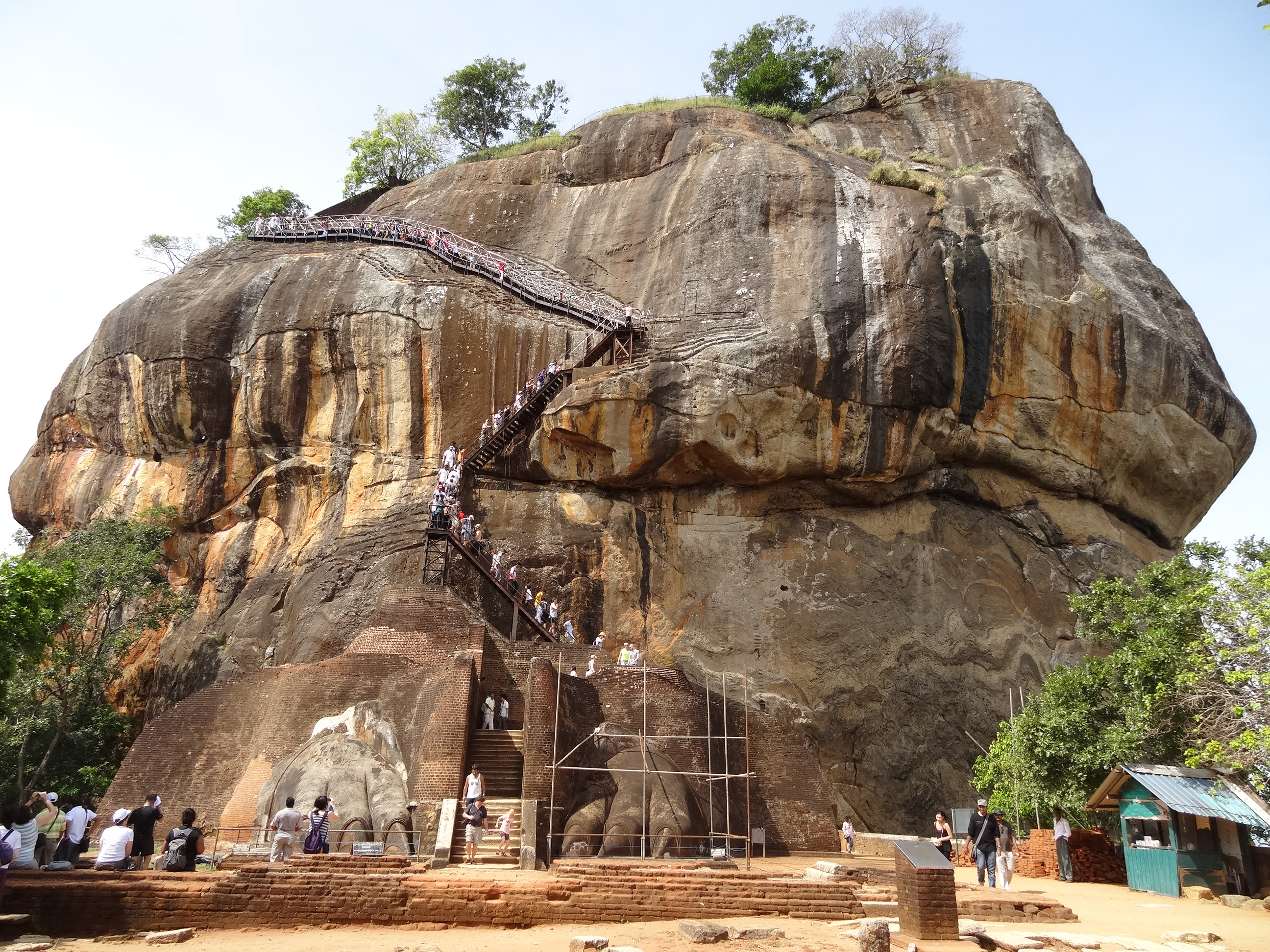 Sigiriya lion gate